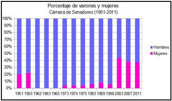 Porcentaje de hombres y mujeres en la Cámara de Senadores de la Nación Argentina entre 1951 y 2011. Fuente: Toppi, Hernán Pablo (2016). «Políticas públicas y derechos políticos: Del voto femenino a las cuotas de género como respuestas a los problemas de representación política de las mujeres en la Argentina». Revista Perspectivas de Políticas Públicas (Enero-Junio 2016) 7 (10): 87-120. ISSN 1853-9254.